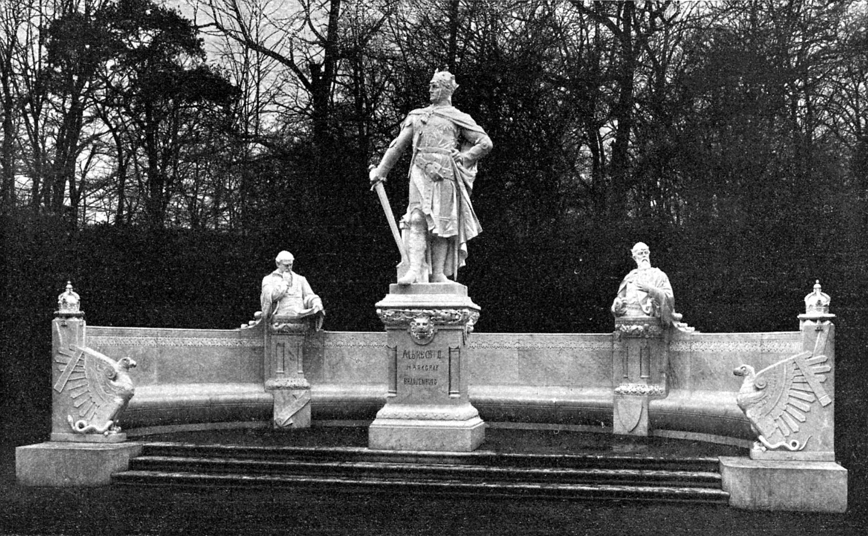 Denkmal für Albrecht II., geschaffen vom Bildhauer Johannes Böse, auf der Siegesallee in Berlin.